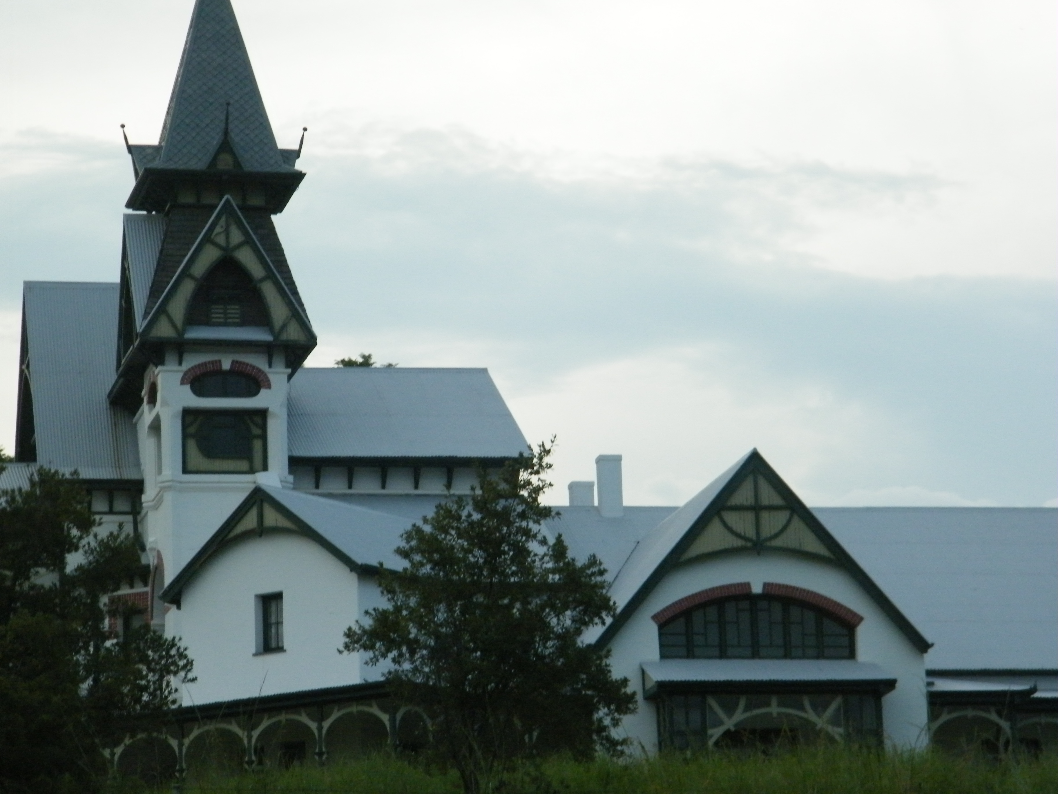 Die Erasmus kasteel/ Spookhuis in Erasmuskloof, Pretoria, RSA